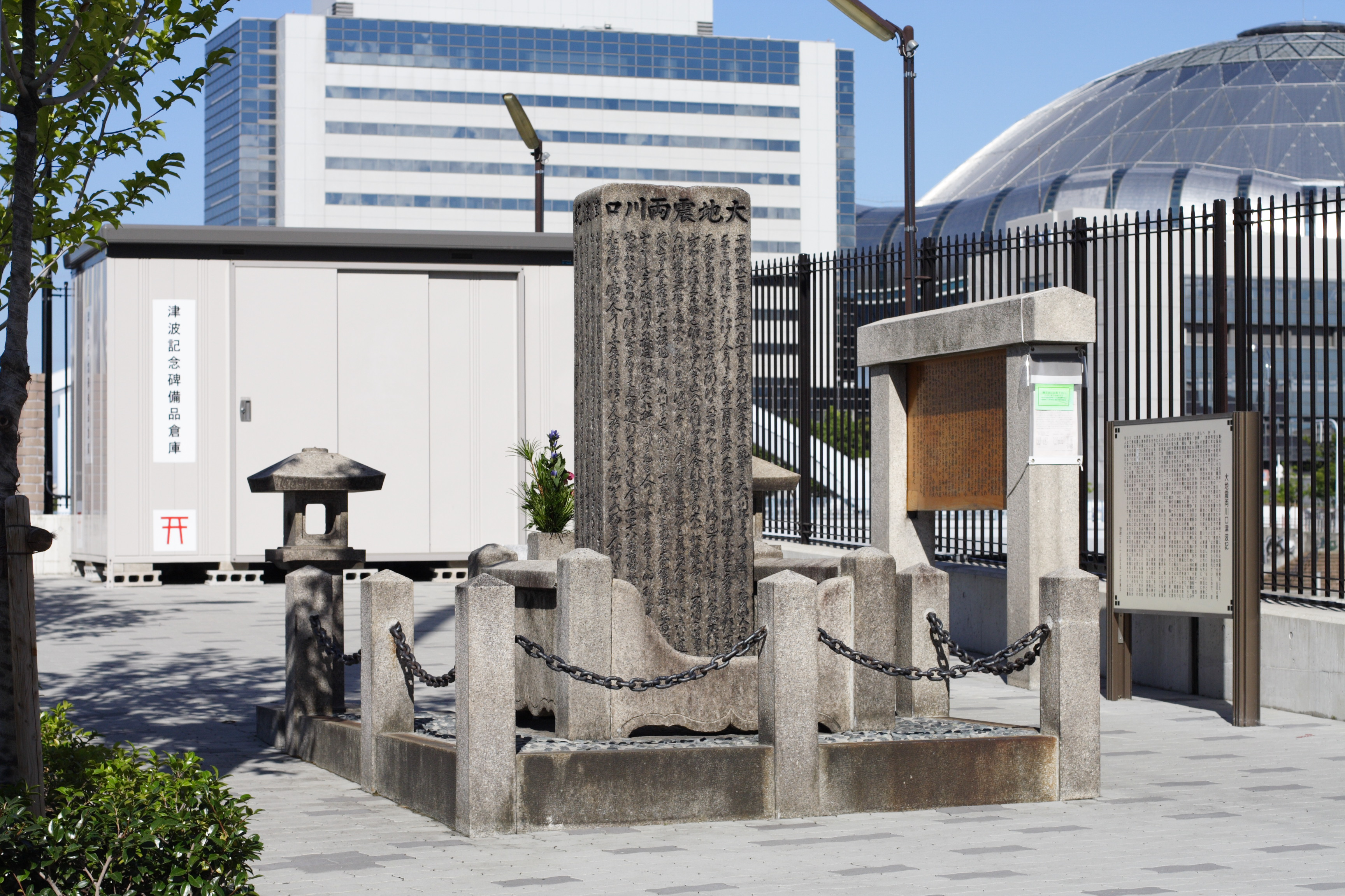 大正橋たもとの津波記念碑（大地震両川口津浪記）安政2年